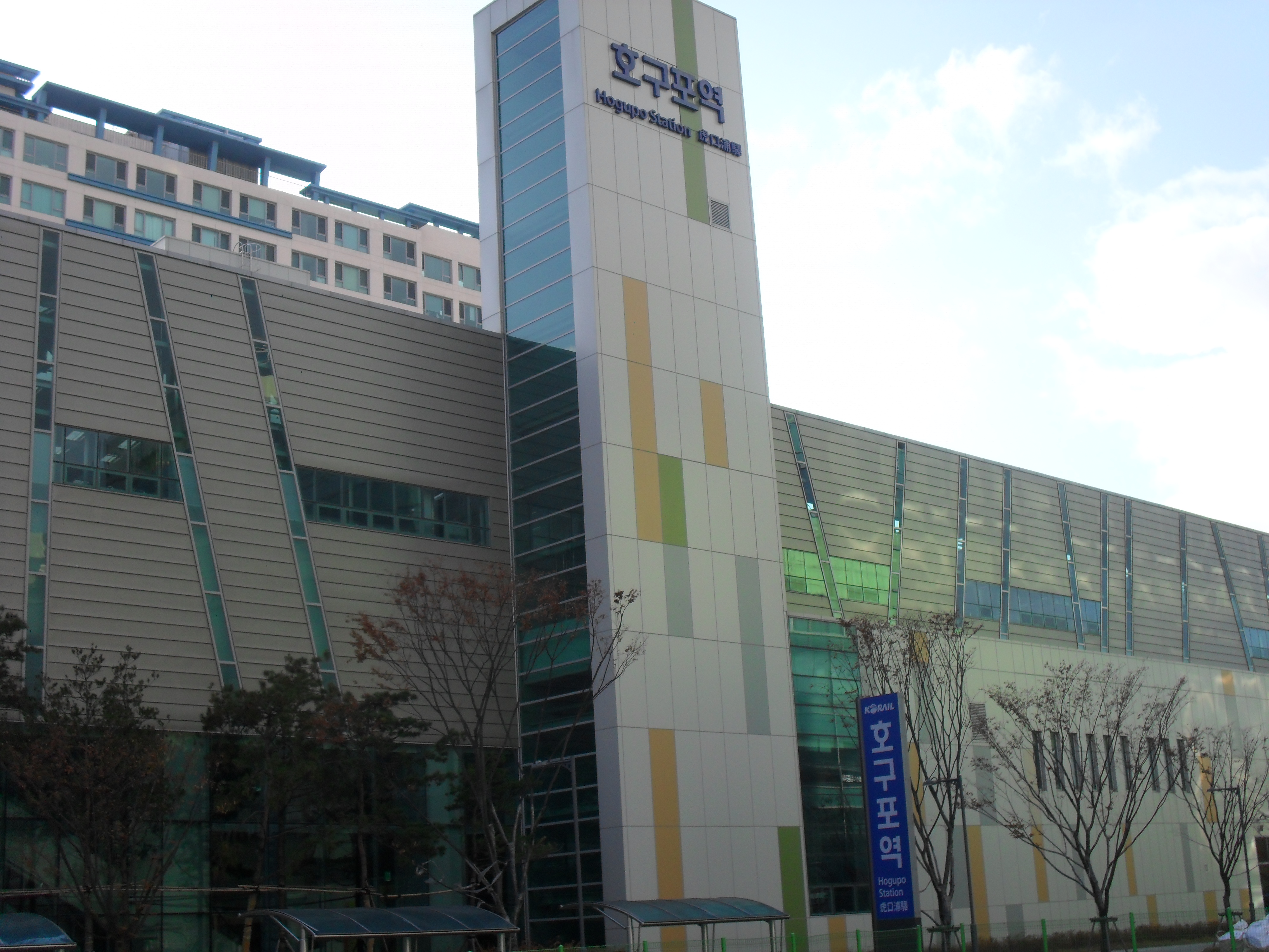 수인선 호구포역